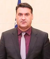 Mehmed Halilović übergibt seine Akkreditierung als BotschafterBosnien und Herzegowinas an Osttimors Staatspräsident Francisco Guterres.